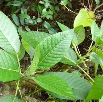 咬人狗 Dendrocnide meyeniana